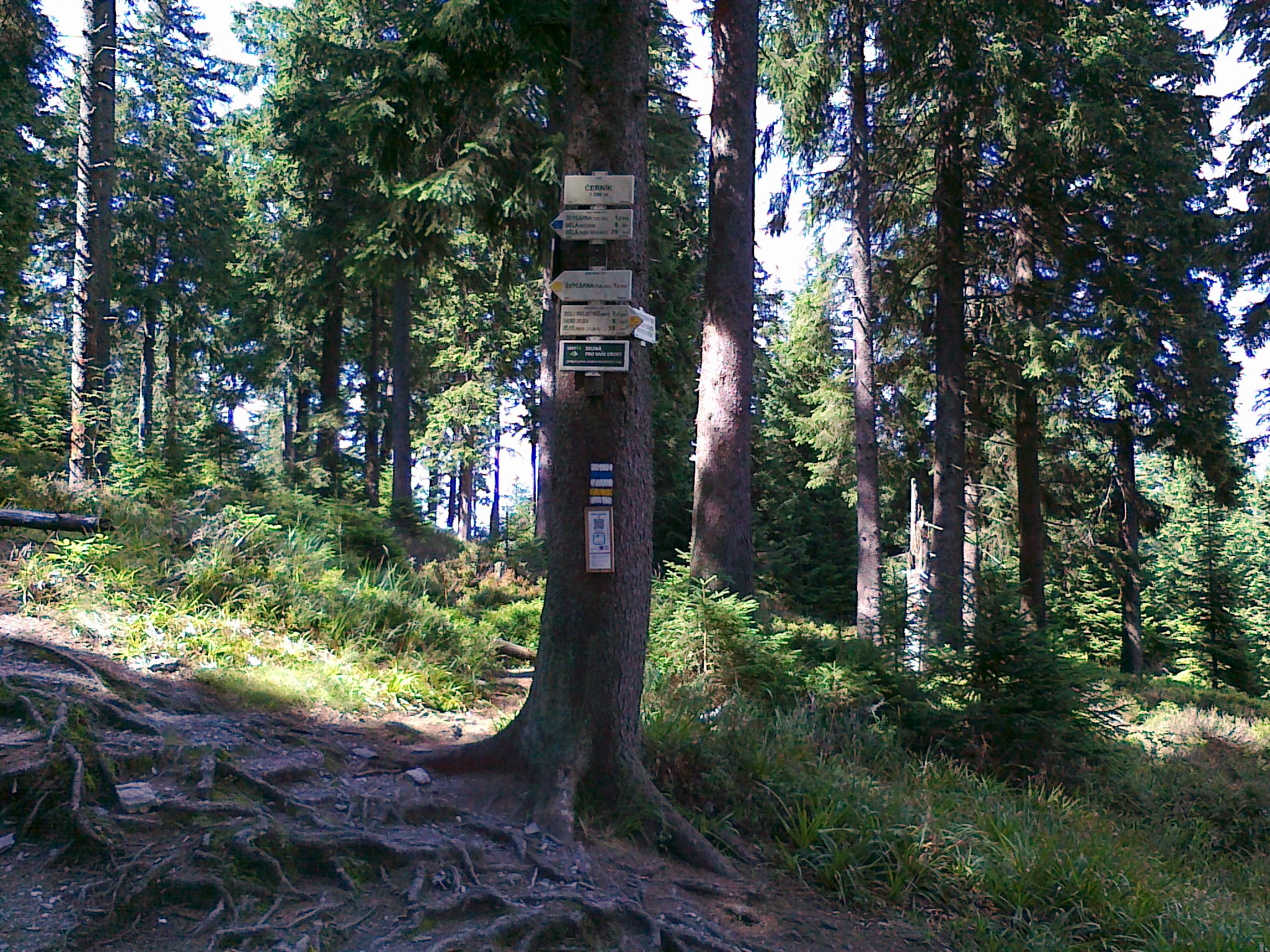 Skrzyżowanie szlaków o nazwie Černík